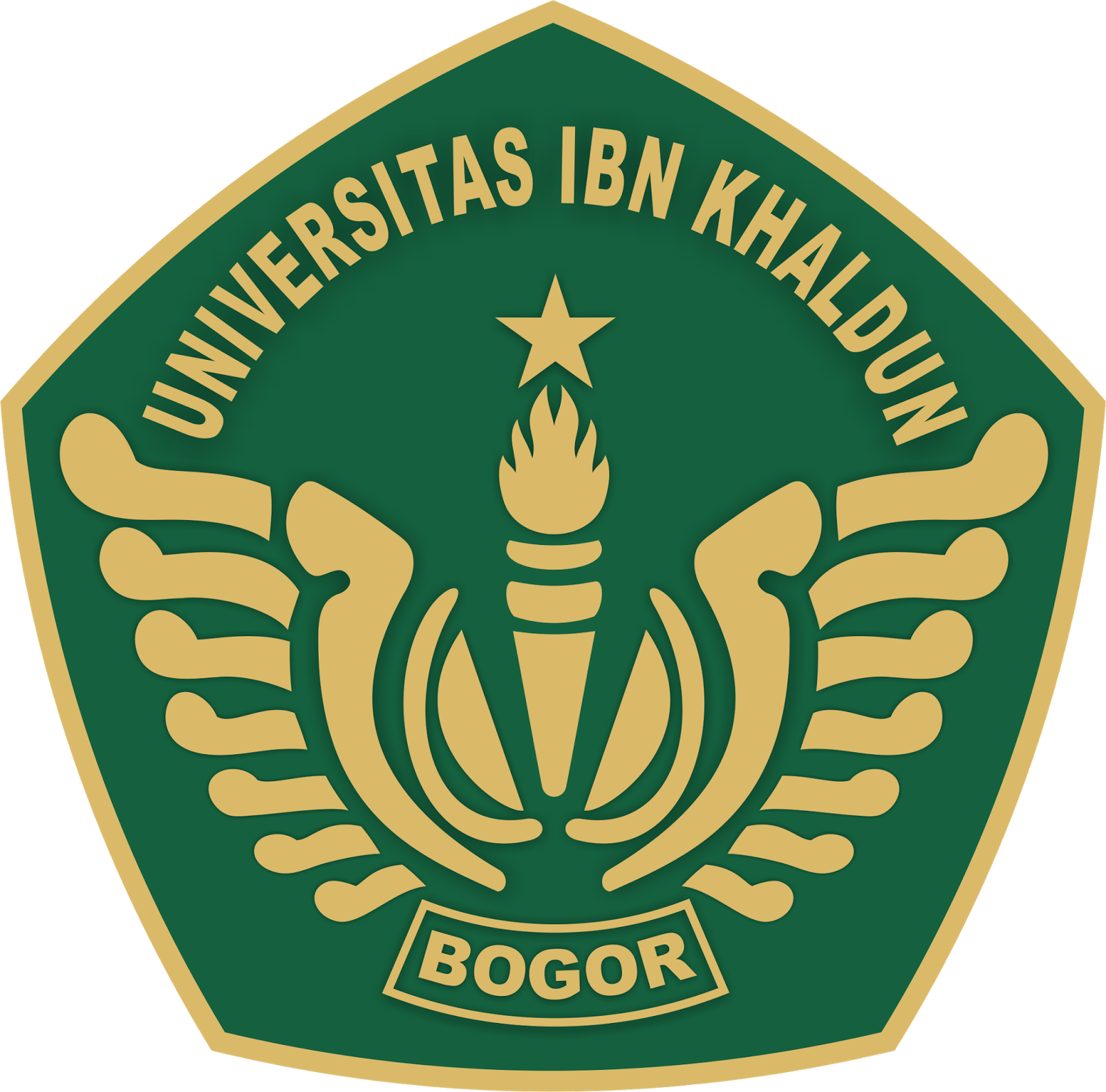 Logo Universitas Ibn Khaldun Bogor